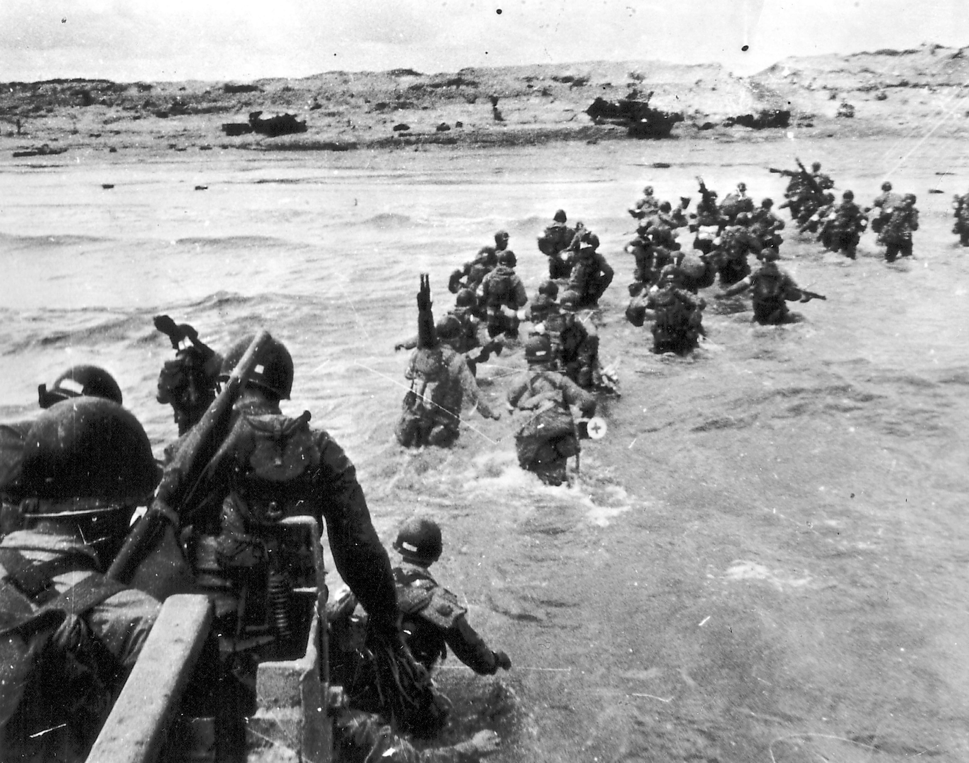 Des soldats américains débarquent sur la plage de Utah Beach à partir d'un navire. Sur la plage, des carcasses de véhicules détruits gisent.